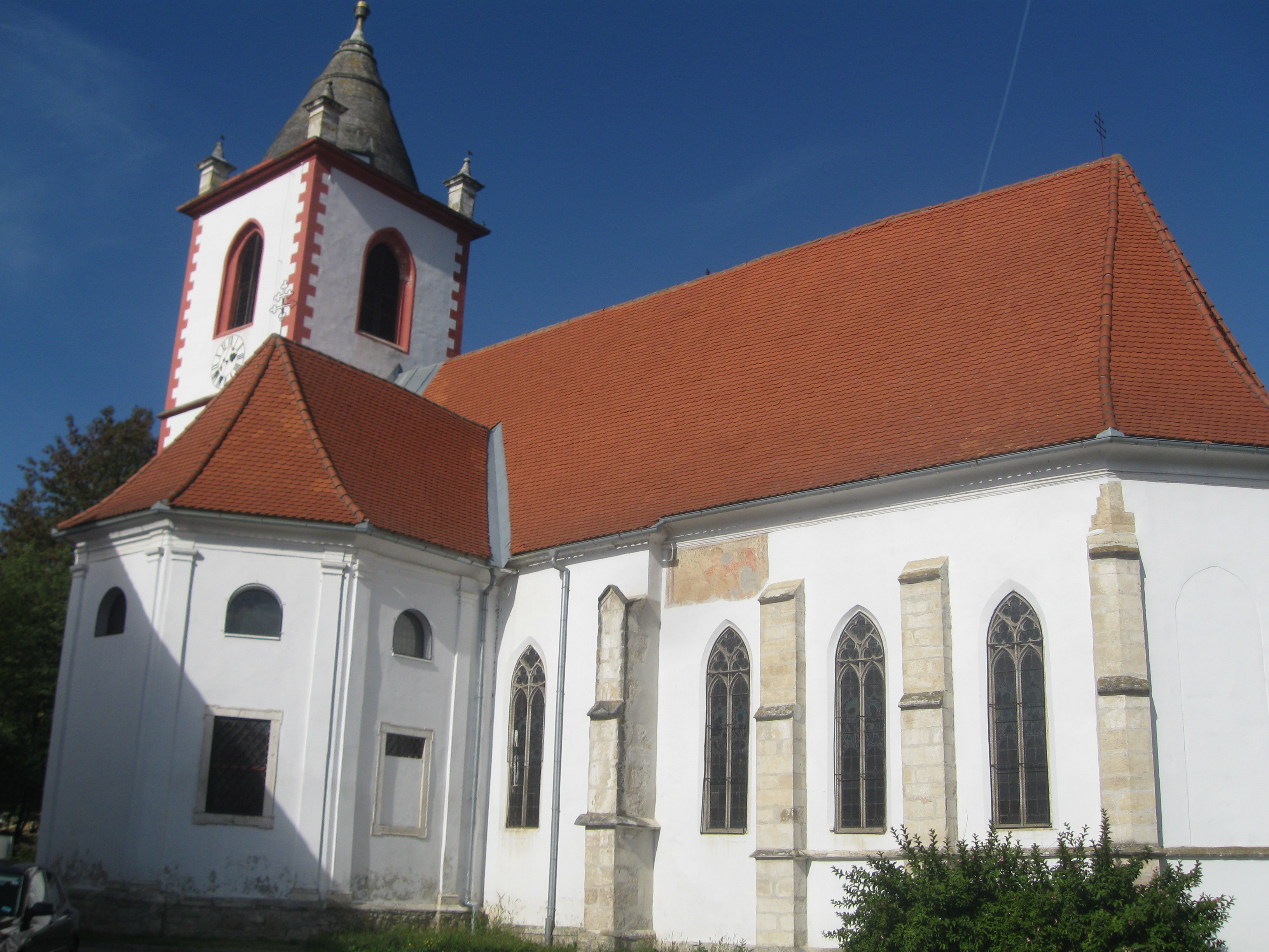 Cerkev v Jareninskem Dolu postavljena leta 1135 in posvečena sv. Mariji.